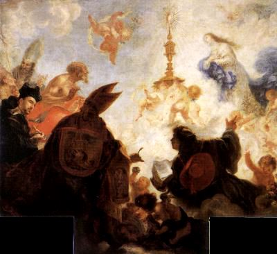 Alegoría de la Eucaristía, Catedral de Sevilla